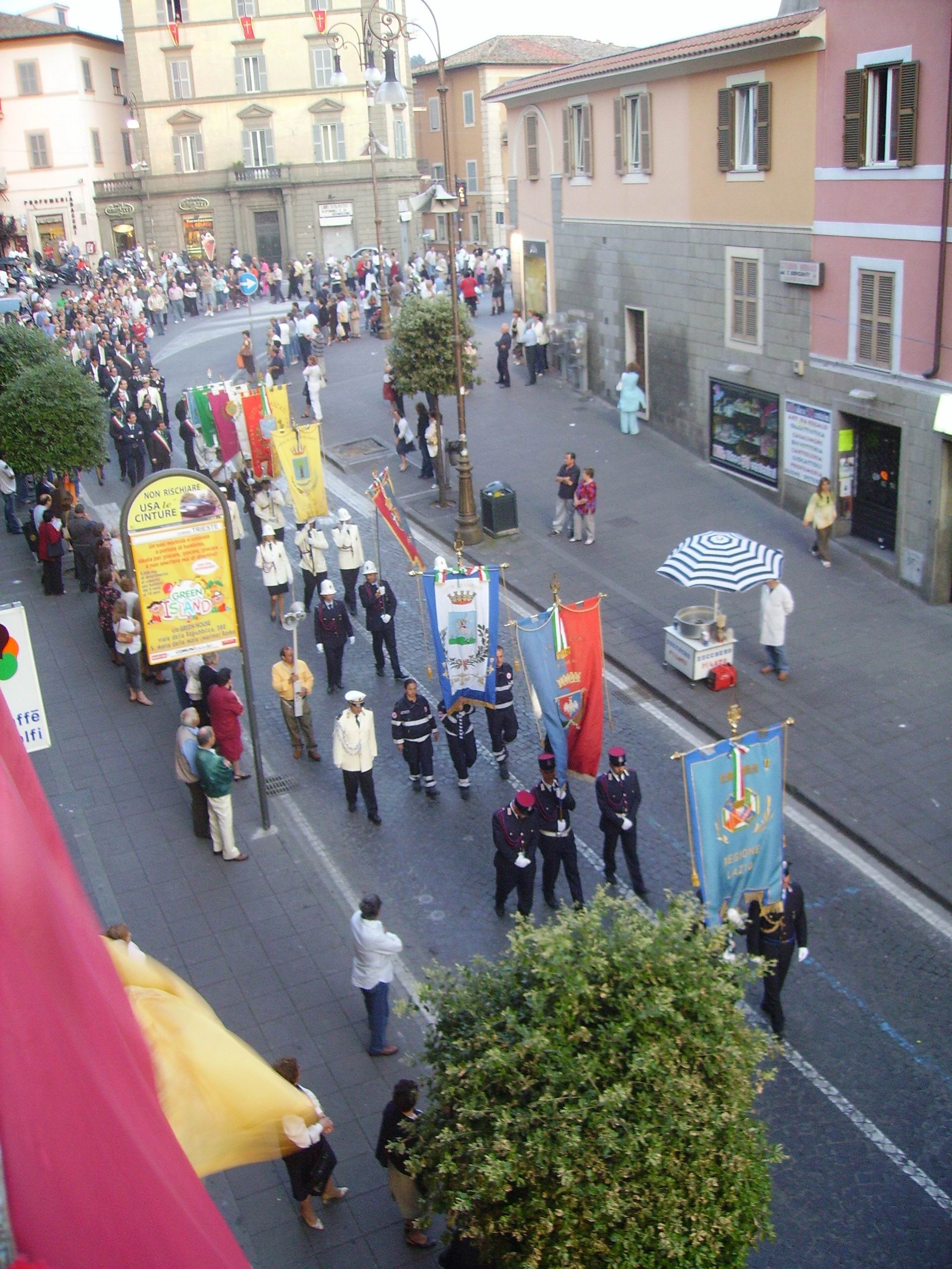 processione dell'11 giugno 2007 parte III